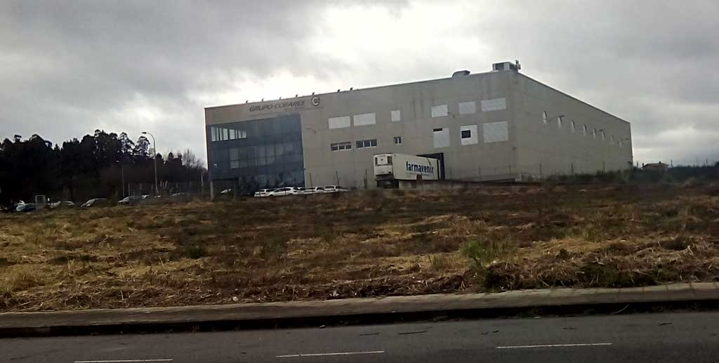 Cofares en Betanzos.